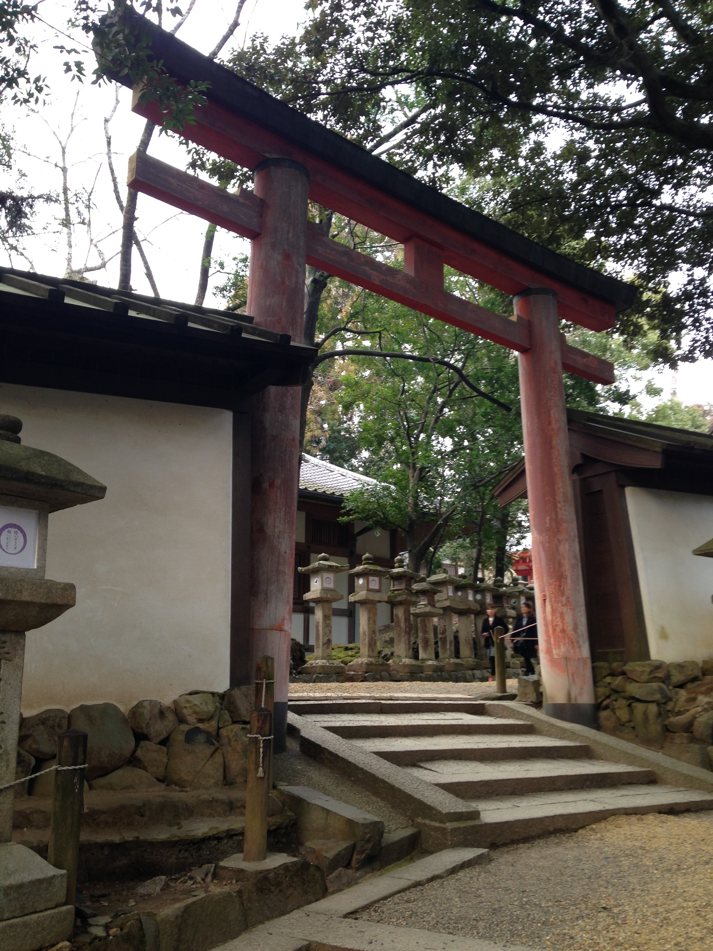 春日大社・慶賀門前の鳥居